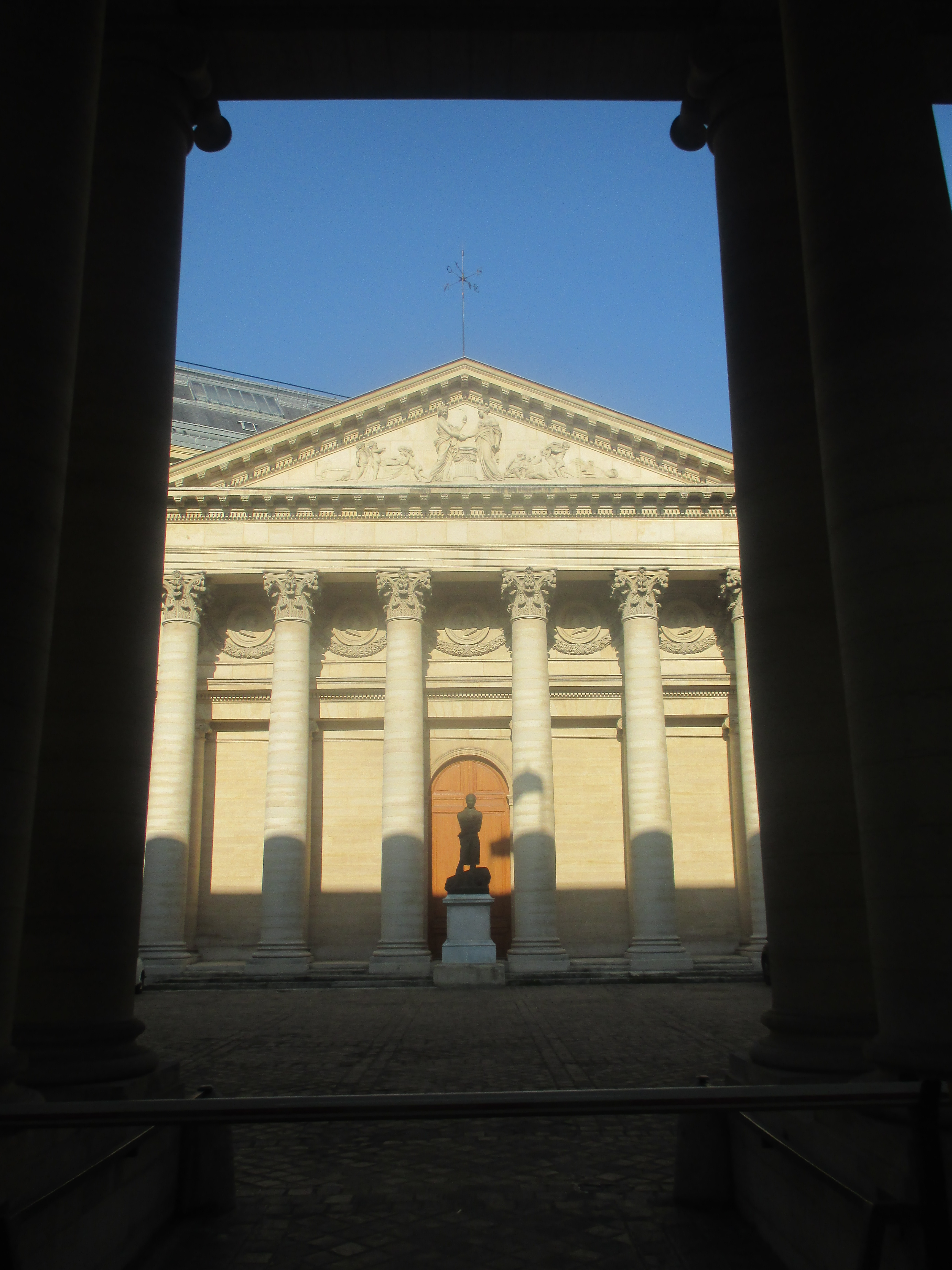 Cour d'honneur du 12 rue de l'École-de-Médecine à Paris. Aujourd'hui Bibliothèque interuniversitaire de santé.